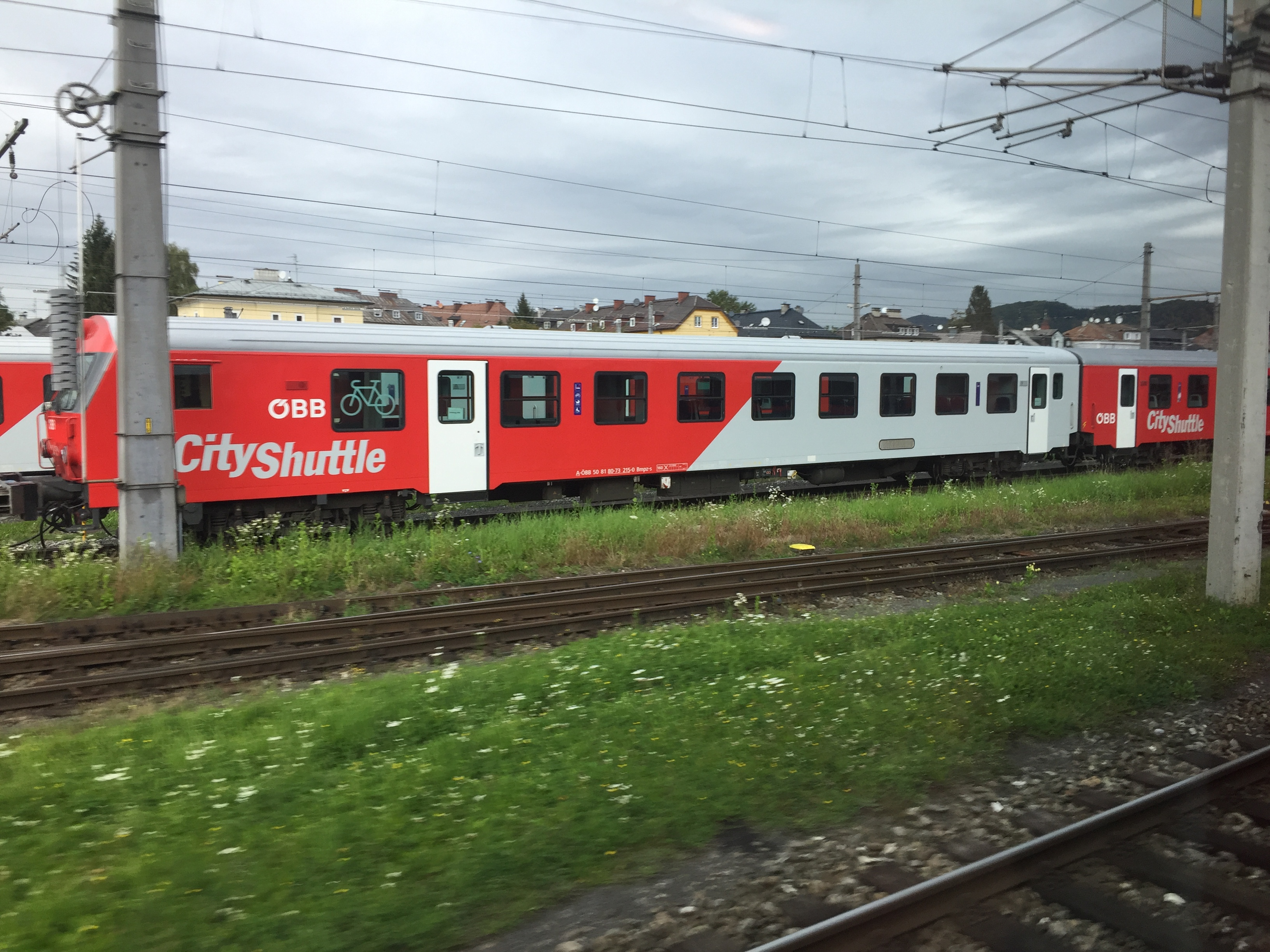 Eine CityShuttle-Garnitur der ÖBB, beim Salzburger Hauptbahnhof